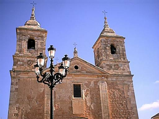 Iglesia de Villagarcia del Llano — province of Cuenca.